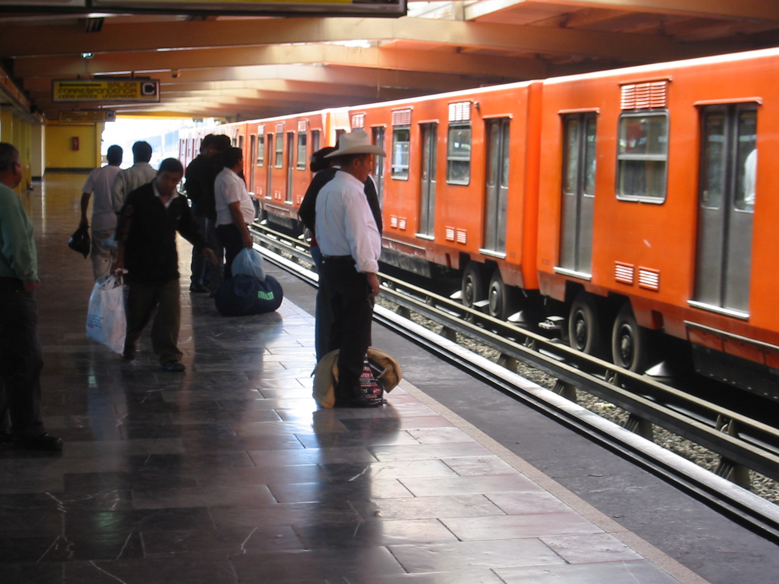 Metro in Mexico City, Metro de la Ciudad de Mexico en la estacion Laraza, en el lado de la linea 5.